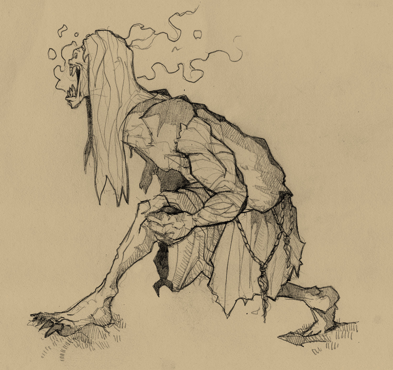 Artystyczna wizja postaci strzygi - demona słowiańskiego, podobnego do wampira.